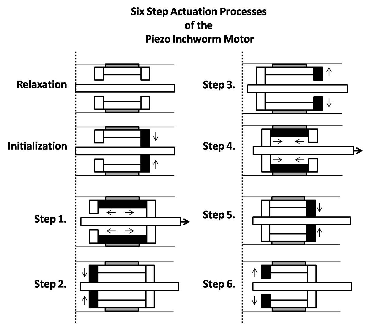 Piezo Inchworm Motor